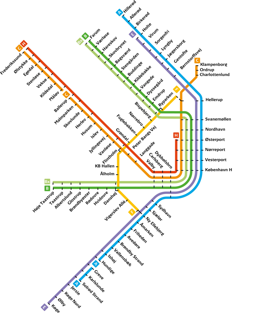 哥本哈根市郊铁路线路图，取自2020年2月15日的丹麦国家铁路官网（哥本哈根市郊铁路是丹麦国家铁路的下属单位）